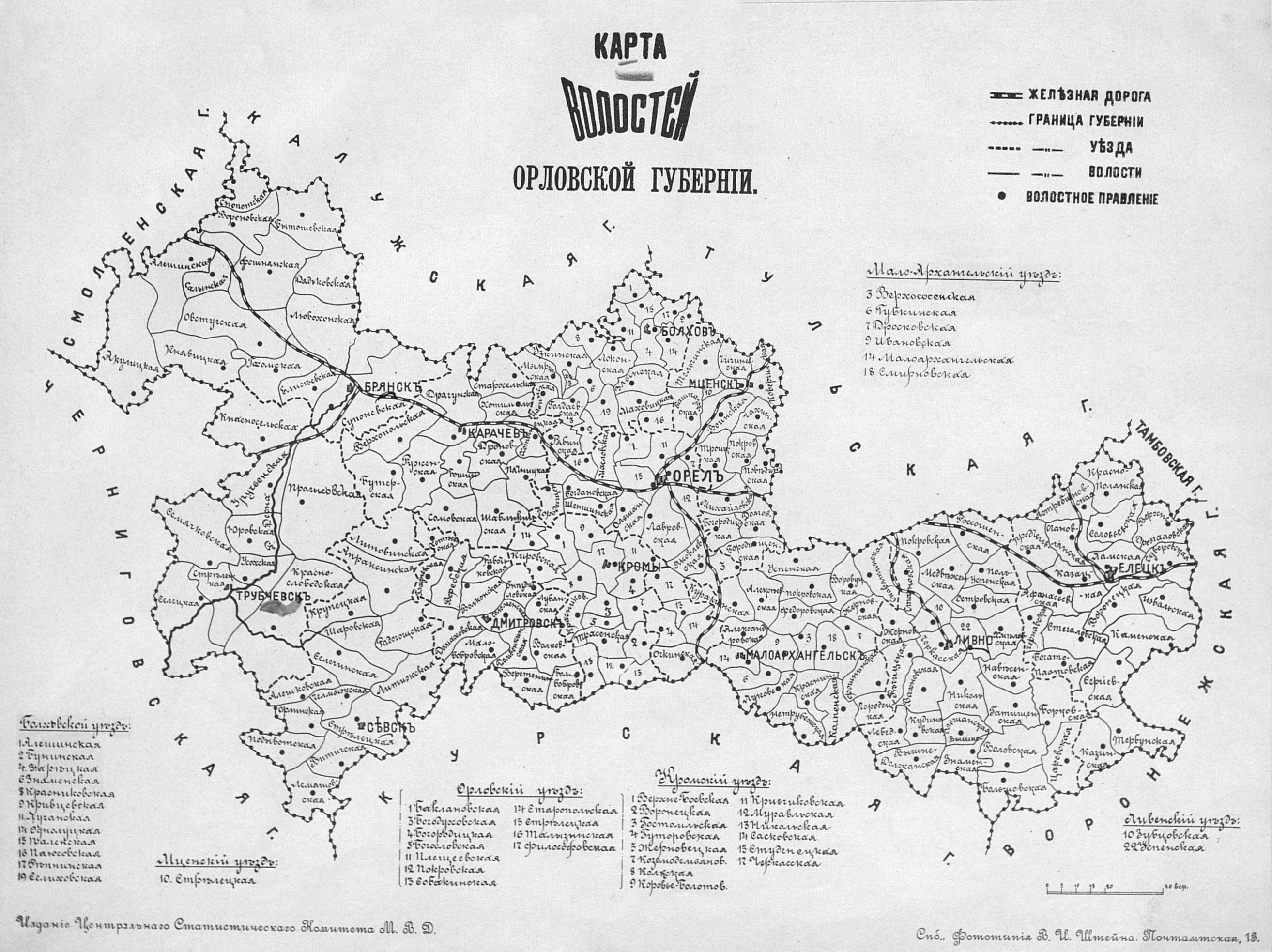 Карта волостей Орловской губернии